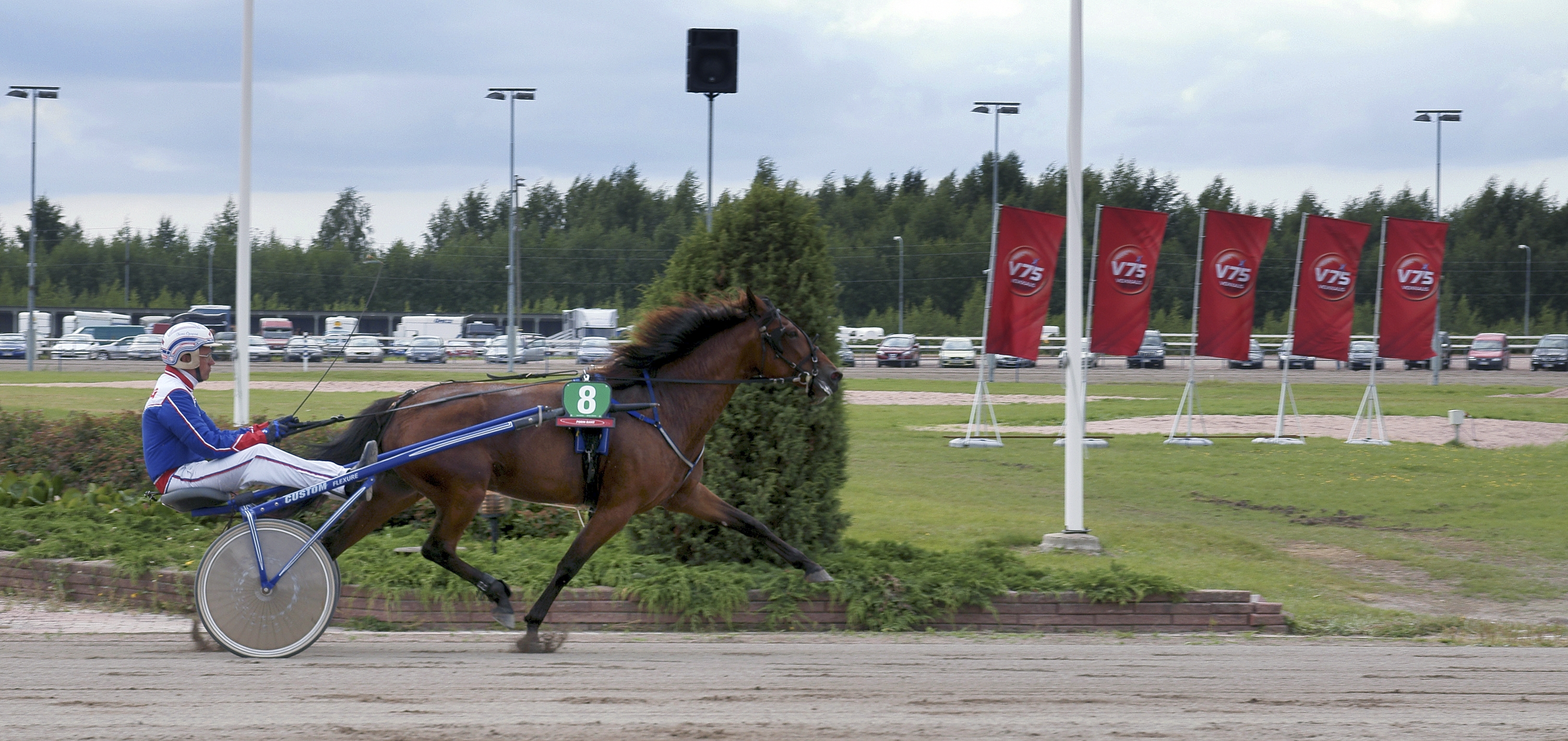 Tuomo Ojanperä ohjastamassa Sweet Sunrisea Porin raviradalla.